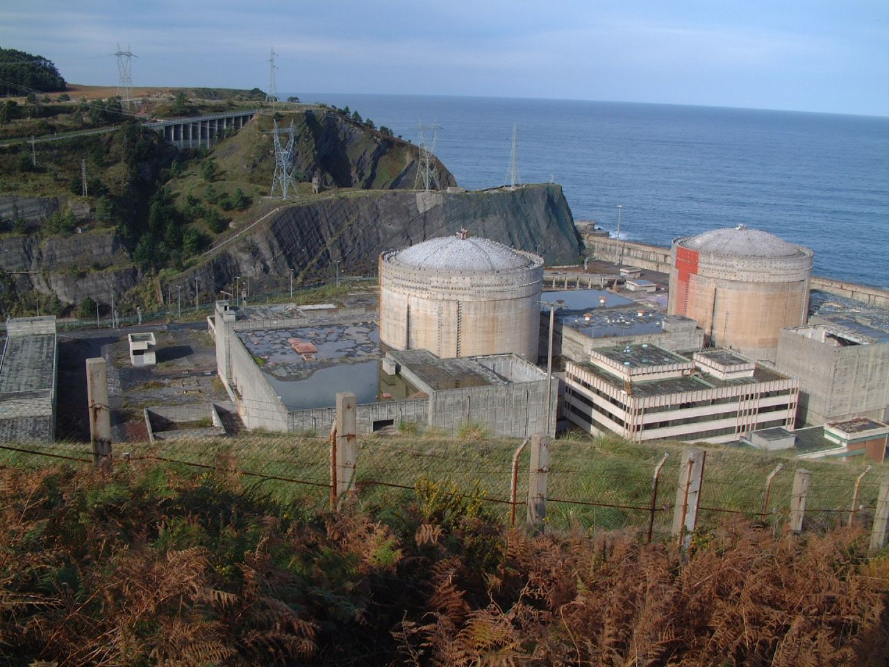 Història de la central que no va entrar mai en funcionament.